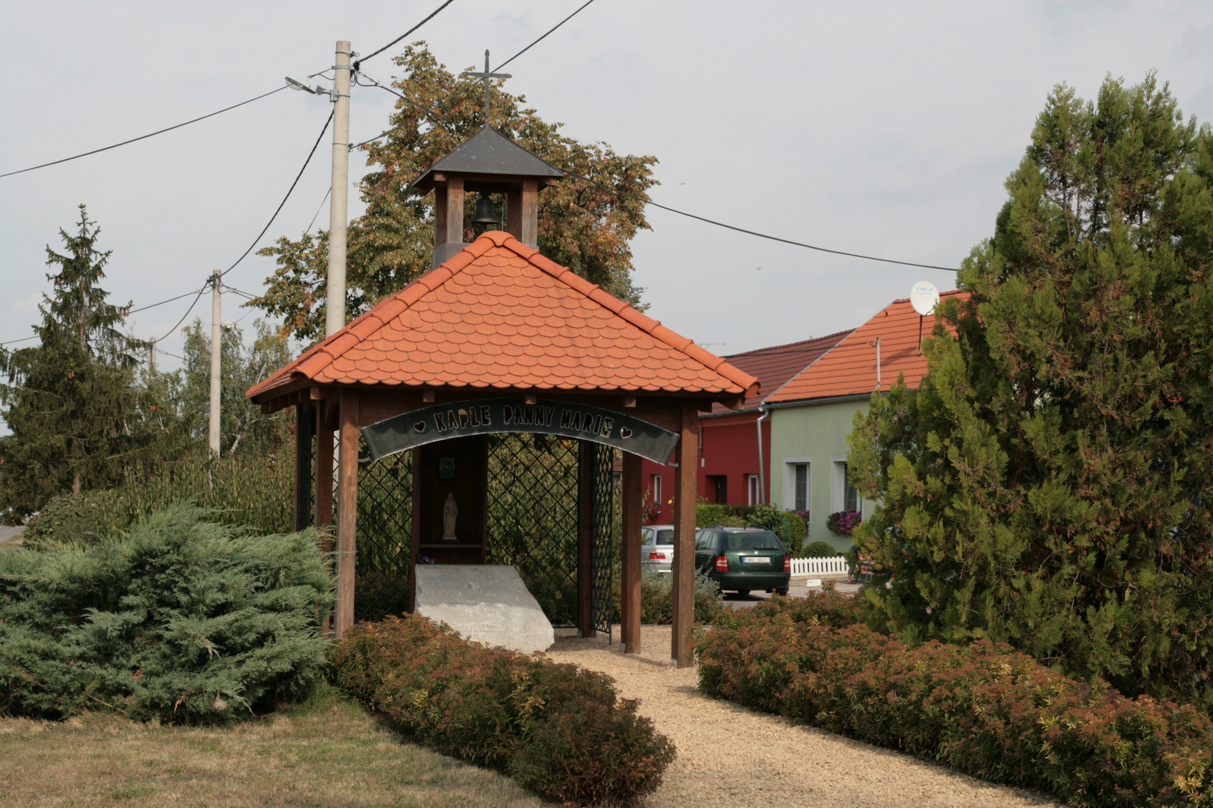 Derflice, část města Znojmo v okrese Znojmo. Kaple Panny Marie na návsi.